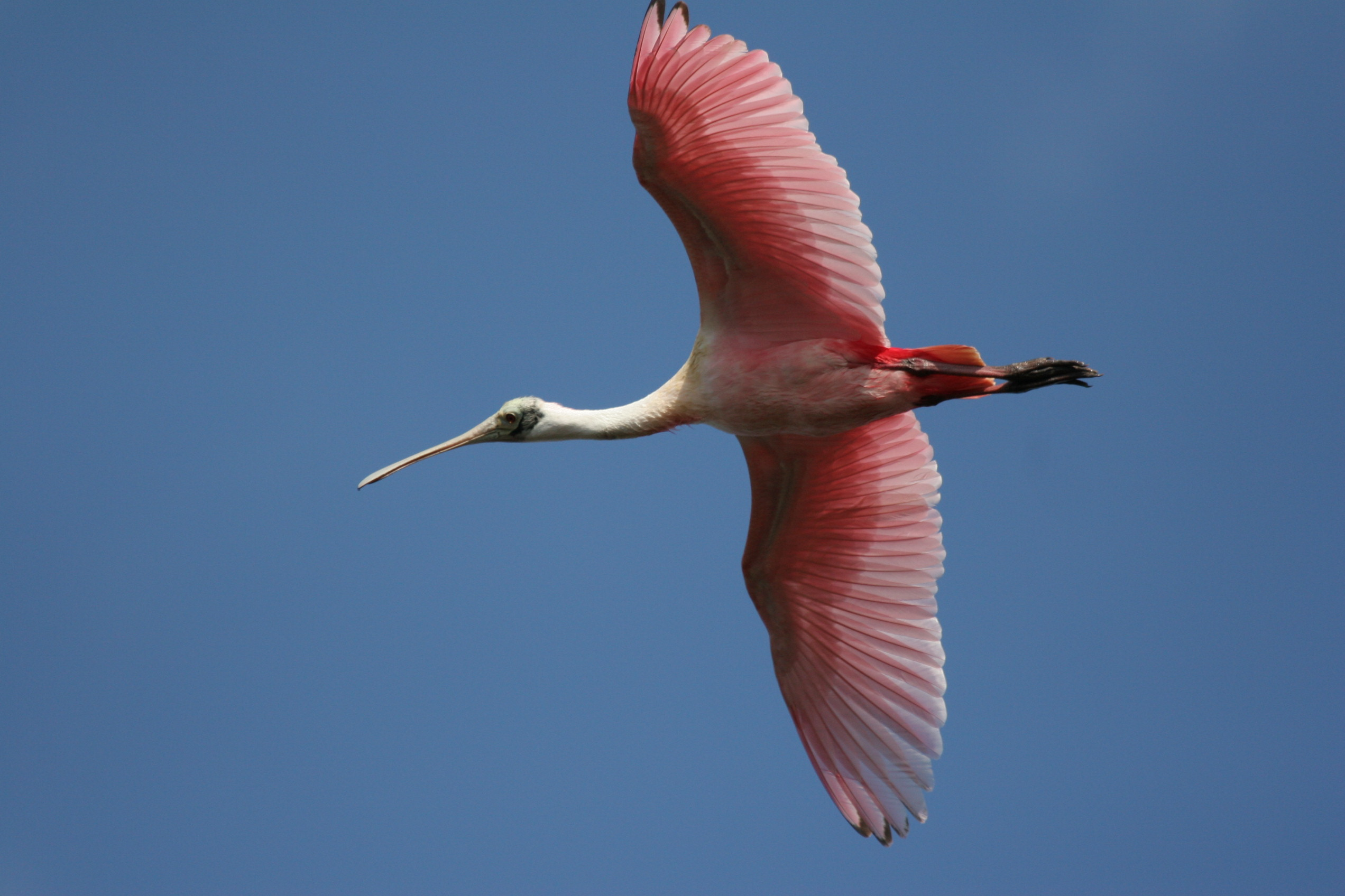 Roseate Spoonbill (Platalea ajaja or Ajaja ajaja)